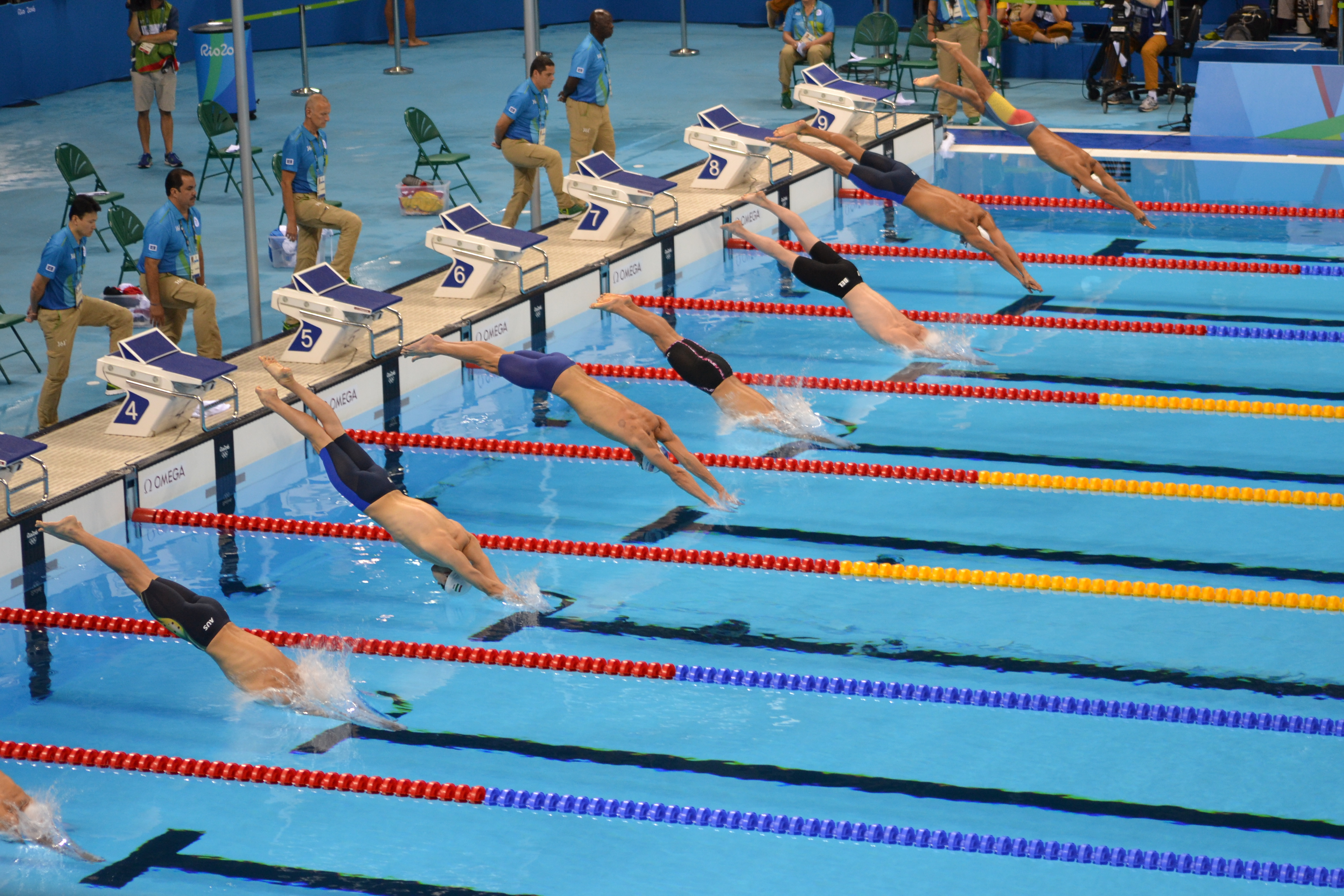 Michael Phelps caindo na água